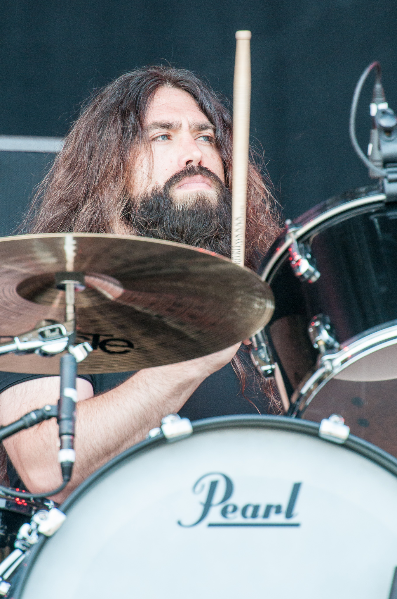 ARGO-Konzerte,Centerstage,Jamie Perkins,Konzert,Livekonzert,Livemusik,Musik,RiP,Rock im Park 2014,The Pretty Reckless